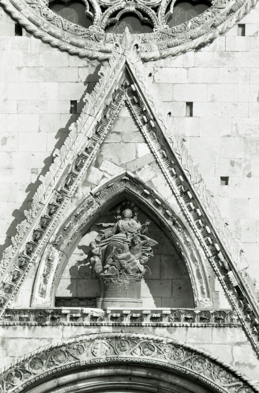 Servizio fotografico : Fermo, 1969 / Paolo Monti. - Strisce: 4, Fotogrammi complessivi: 19 : Negativo b/n, gelatina bromuro d'argento/ pellicola ; 35 mm. - ((I fotogrammi hanno una doppia numerazione. . - Sul portanegativi: Nikon FP4. - Sul dorso del portanegativi Monti specifica: "Marche.". - Occasione: Documentazione per la pubblicazione: "TOURING CLUB ITALIANO, Marche, Milano, TCI, 1971". - Fonte: Agenda di Paolo Monti: Monti/ 3 aprile 1966 - 9 marzo 1971/ 12421-16823 (1966-1971), presso Archivio Paolo Monti. - Fonte: Monografia: TOURING CLUB ITALIANO, Marche, Milano, TCI, 1971 (1971). - Fonte: Agenda di Paolo Monti: Monti - Agenda 1969 (1969), presso Archivio Paolo Monti